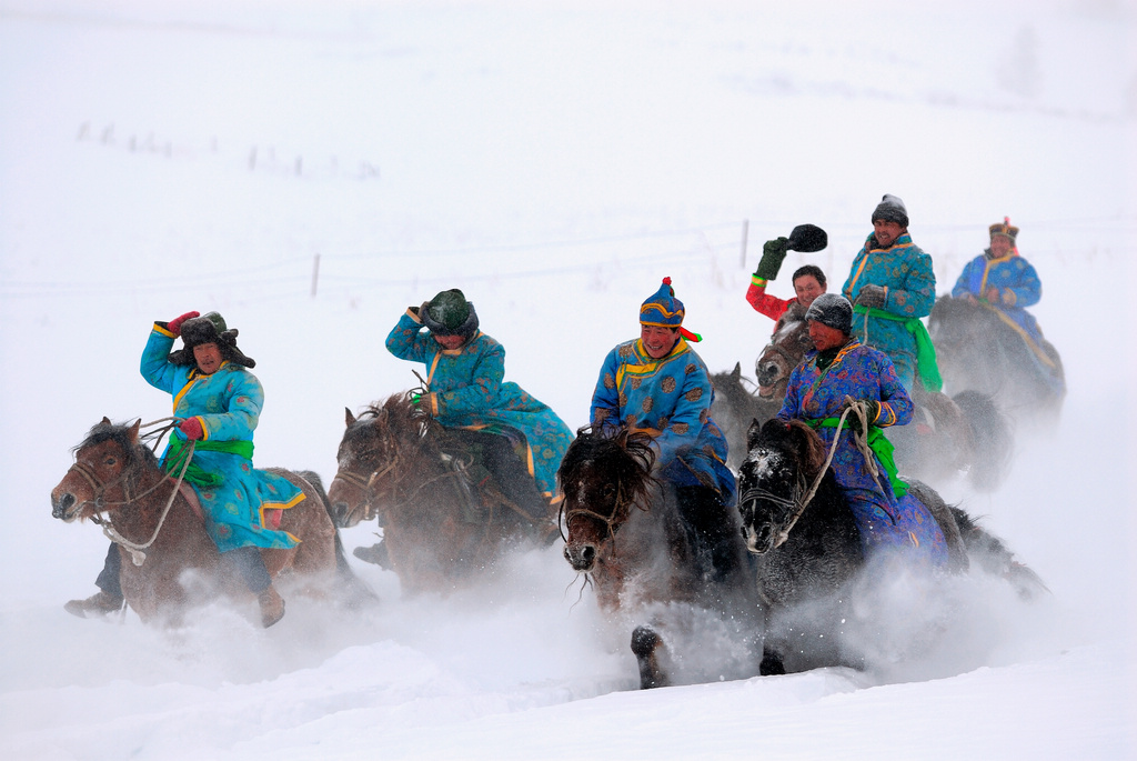 图瓦人赛马图